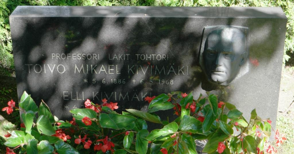 Grab des finnischen Rechtswissenschaftlers und Politikers Toivo Kivimäki (1886-1968) auf dem Friedhof Hietaniemi in Helsinki